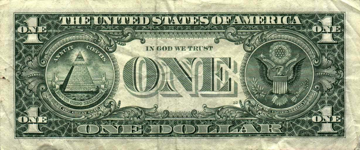 Reverso del billete de un dolar